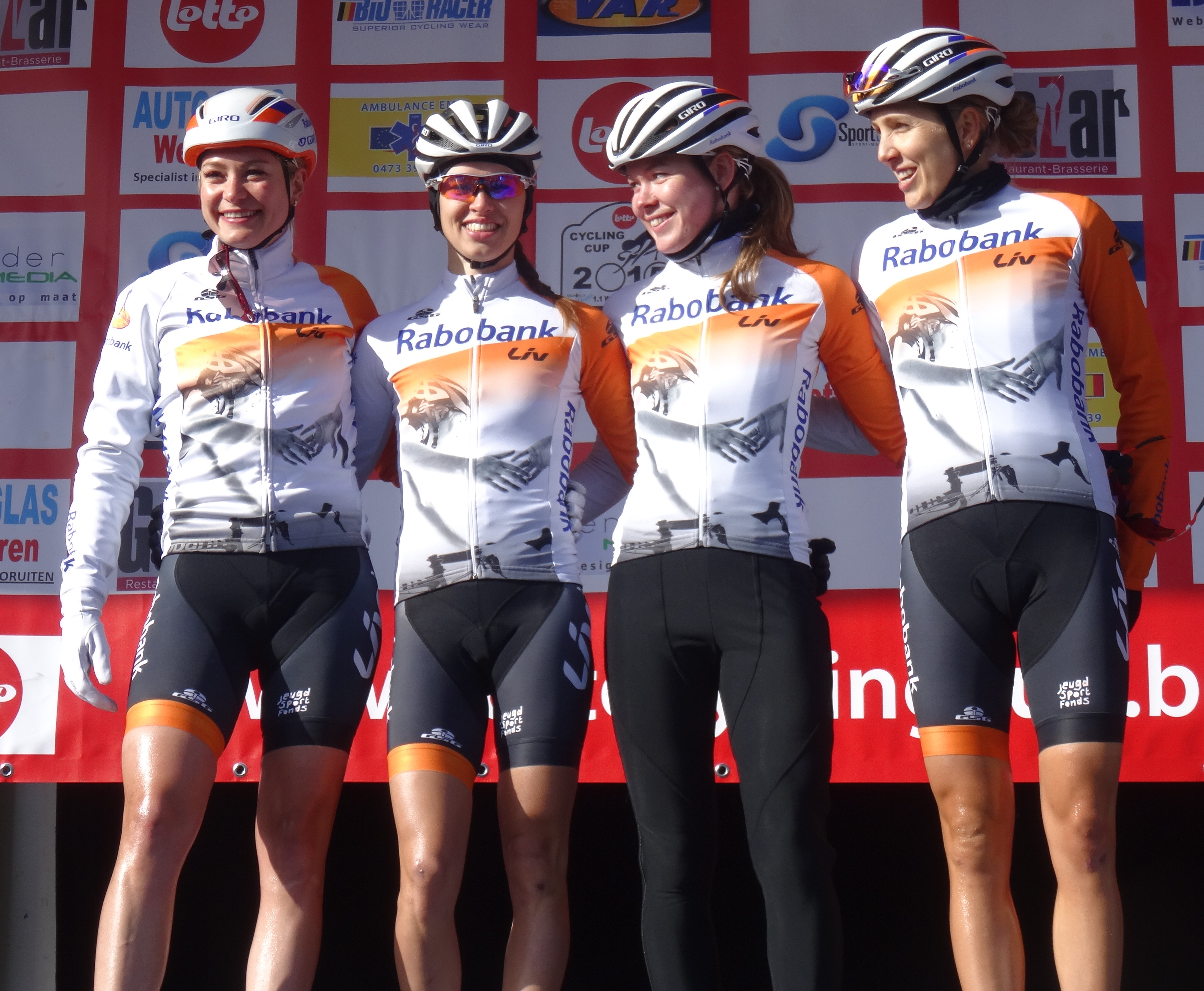 Reportage réalisé le mercredi 4 mars à l'occasion du départ du Samyn des Dames 2015 et du Samyn 2015 à Quaregnon, Belgique.